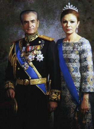 Shah and his queen Farah